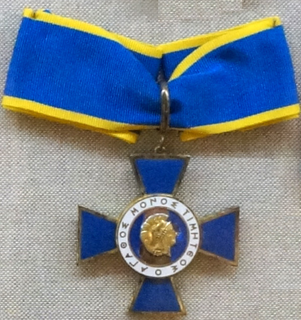 Présentées au musée.